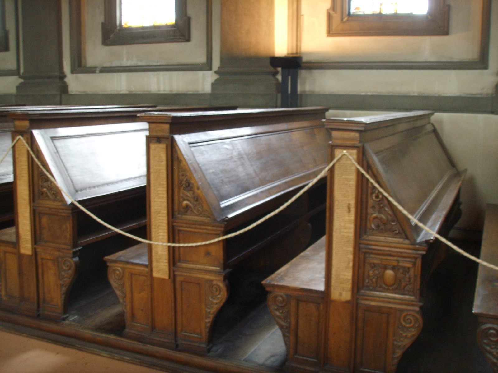 Biblioteca medicea laurenziana scranni